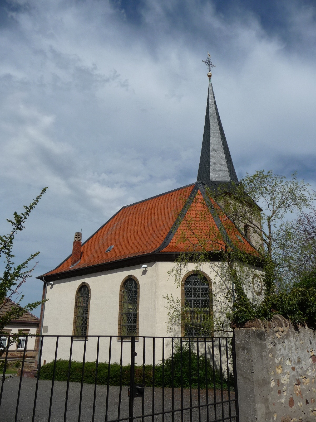 Bissersheim